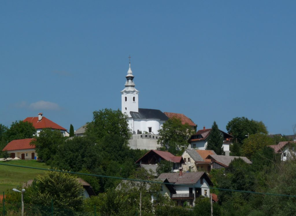 Sveti Andrej v Beli Cerkvi